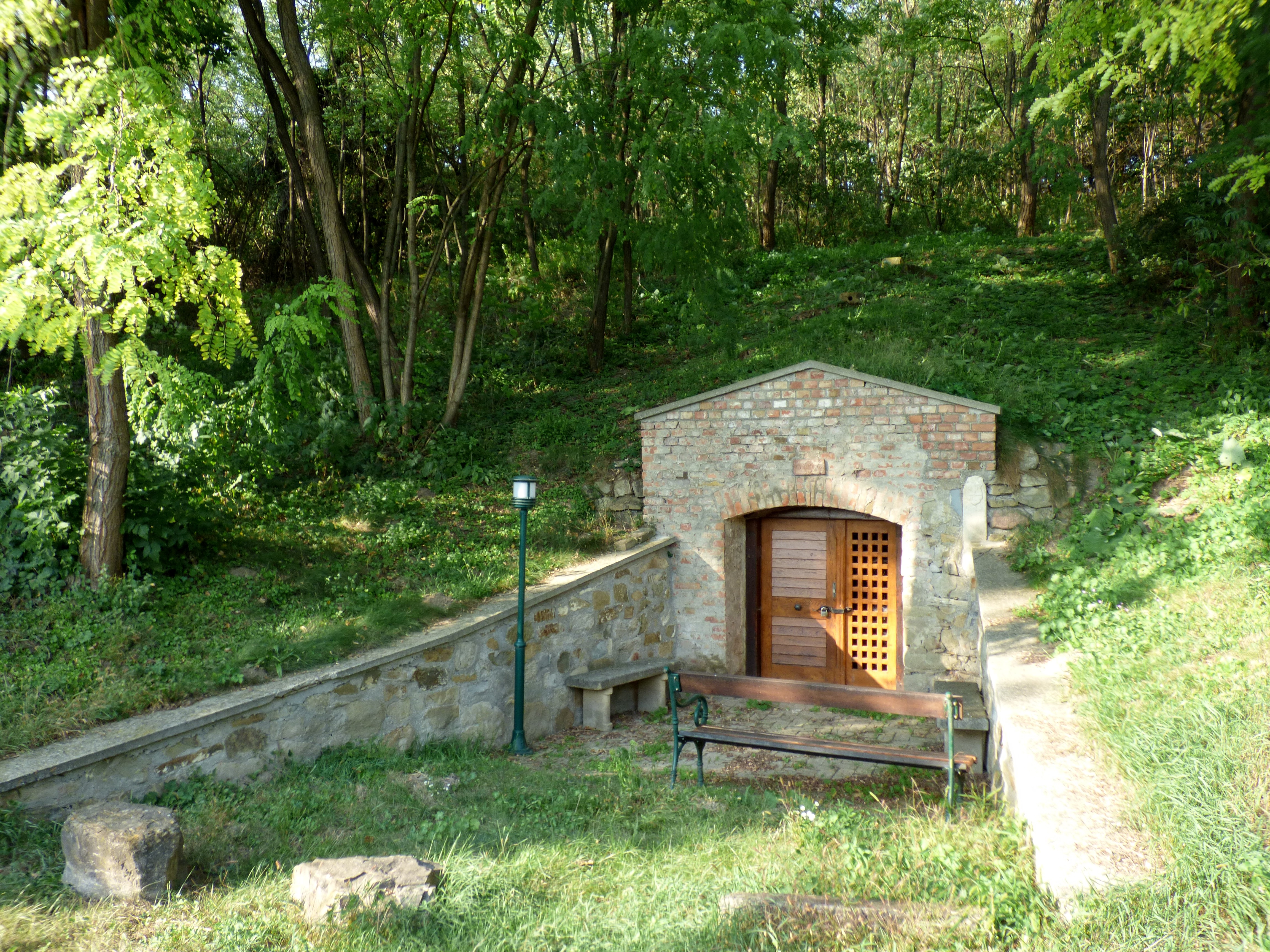 Kellergasse Viehtrift / Hiataberg Flandorf, Gemeinde Hagenbrunn (Niederösterreich)